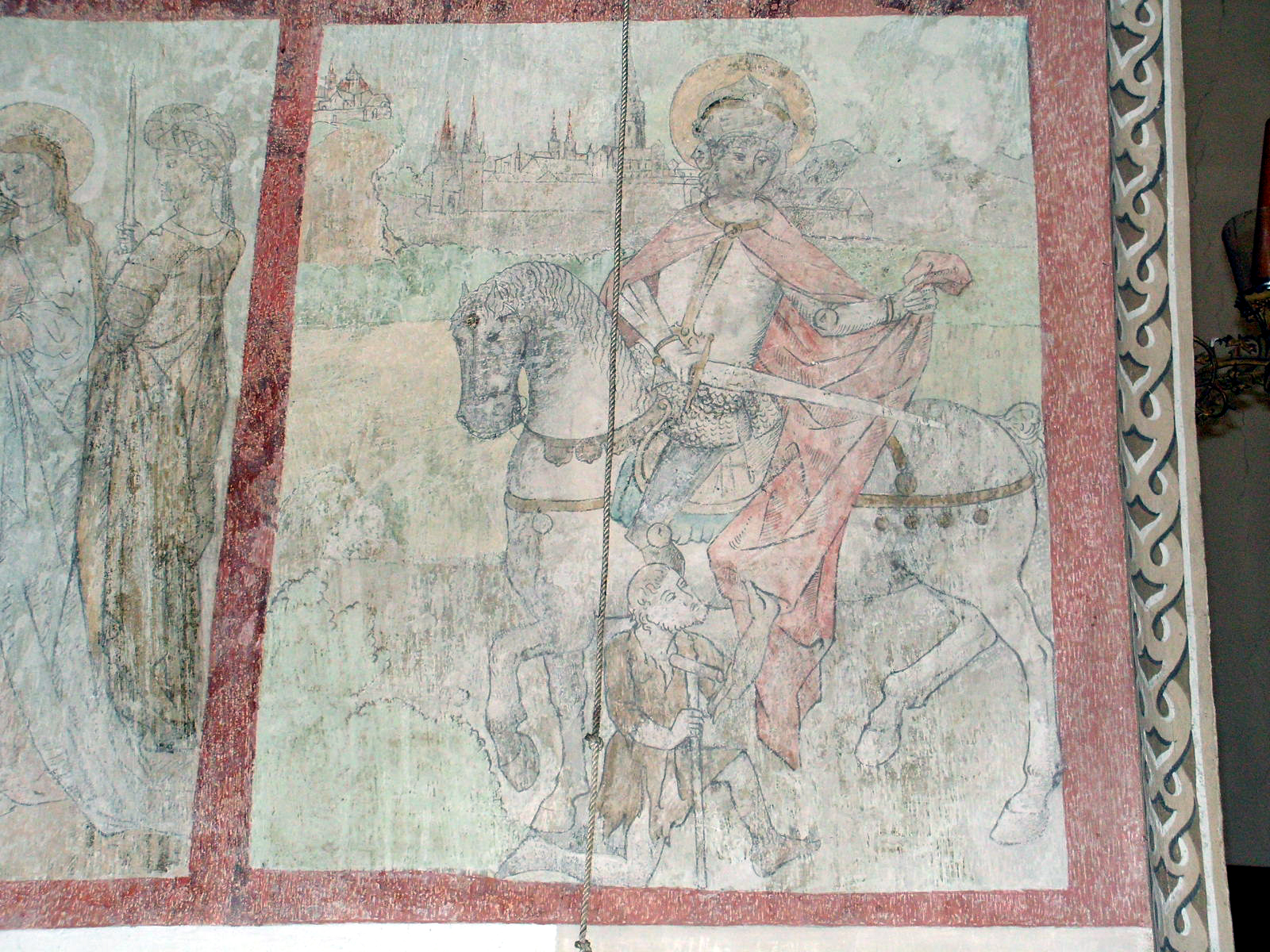 Dingolfing, Pfarrkirche St. Johannes, Wandfresko in der Kapelle der Bäckerknechte (Ausschnitt). Datstellung des St. Martin